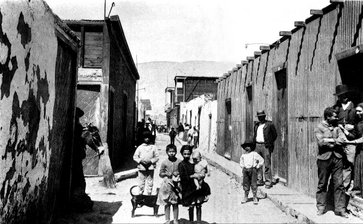 Niños y pobladores en calle principal del pueblo de La Noria, Tarapacá, ca. 1910